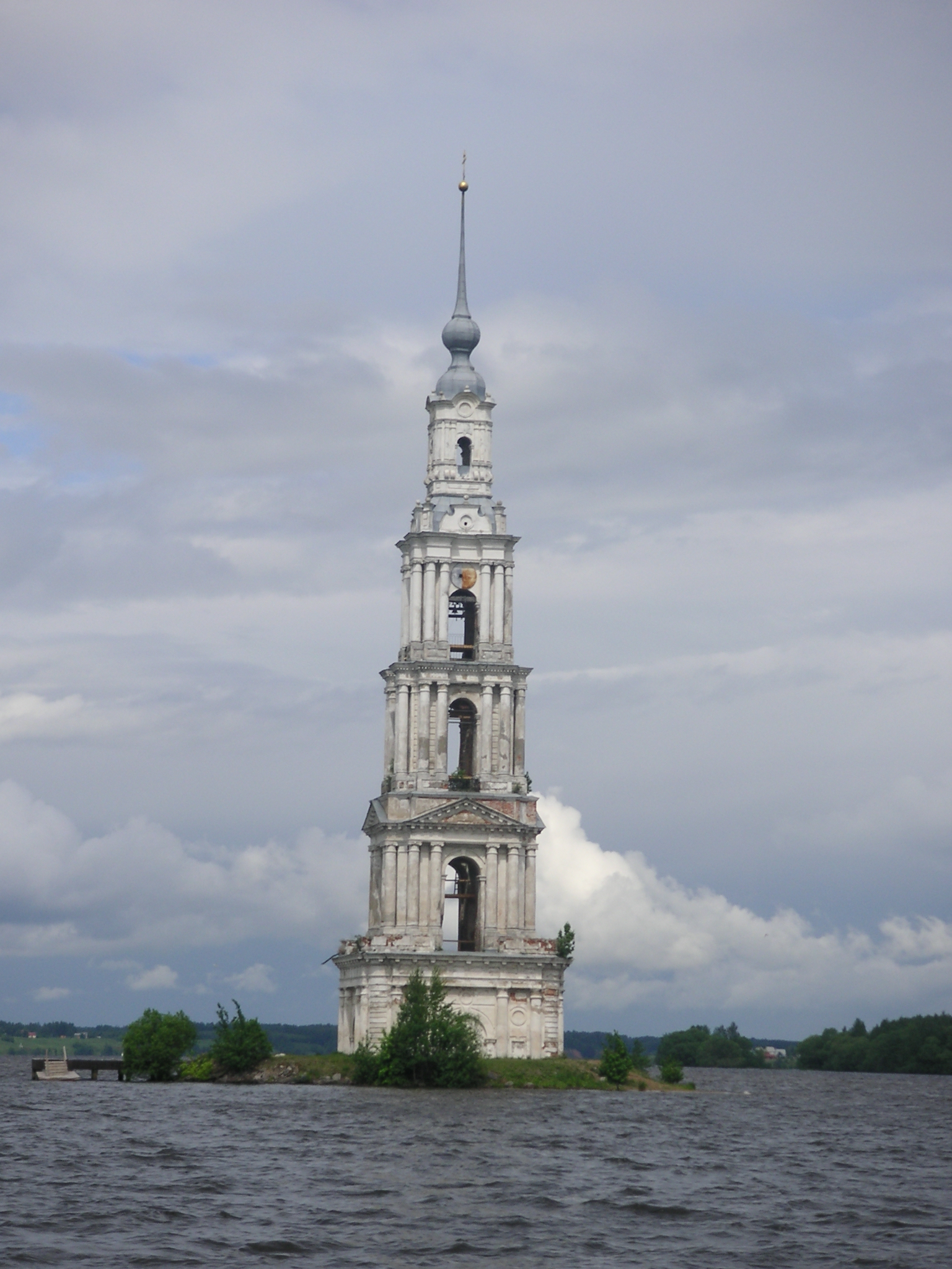 Калязин?